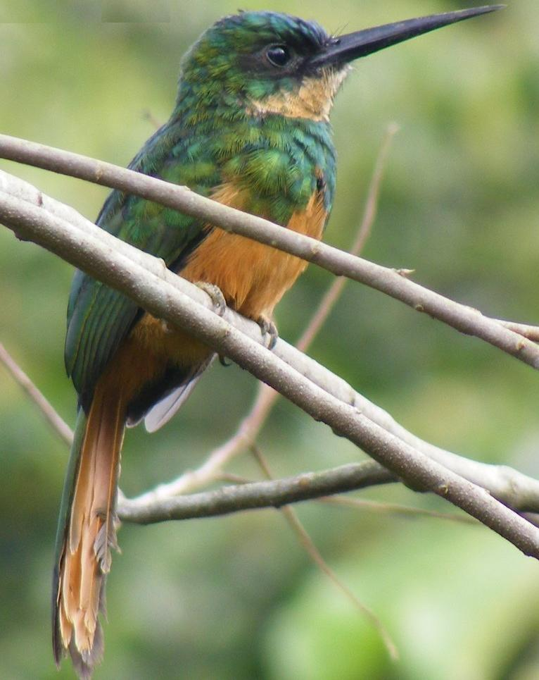 female Rufous-tailed Jacamar (Galbula ruficauda)